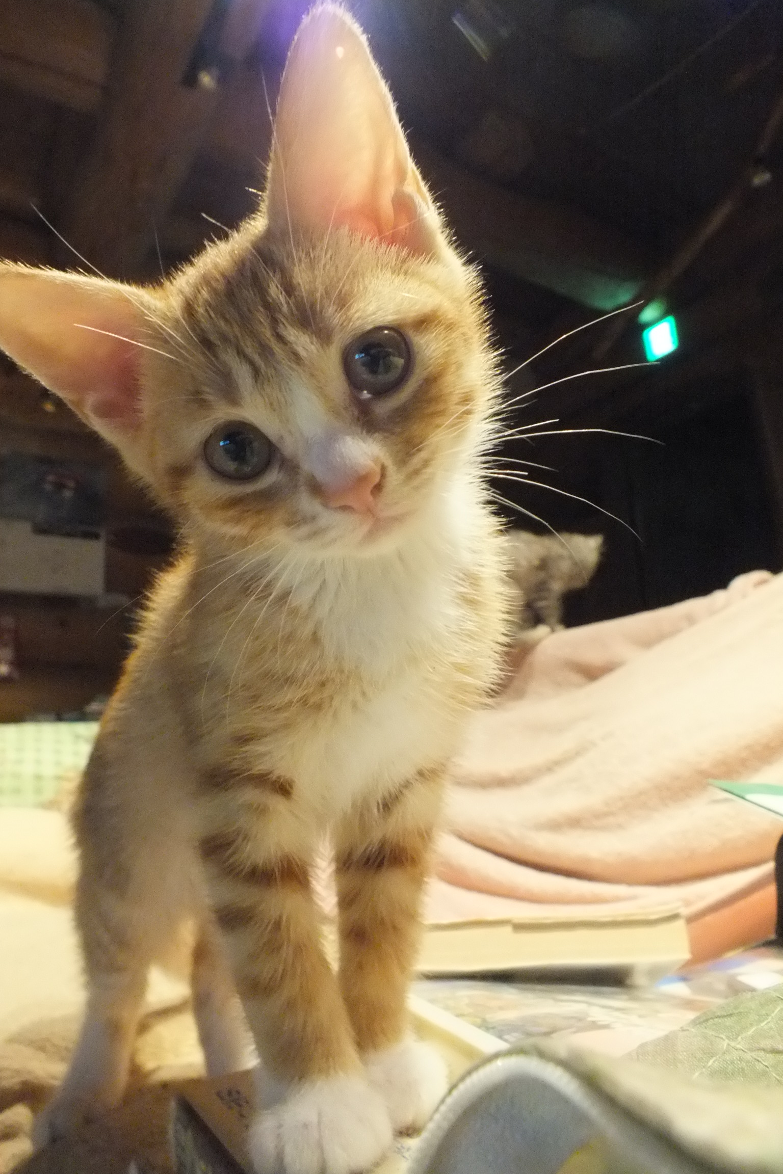 Orange and white tabby cat born in 2016